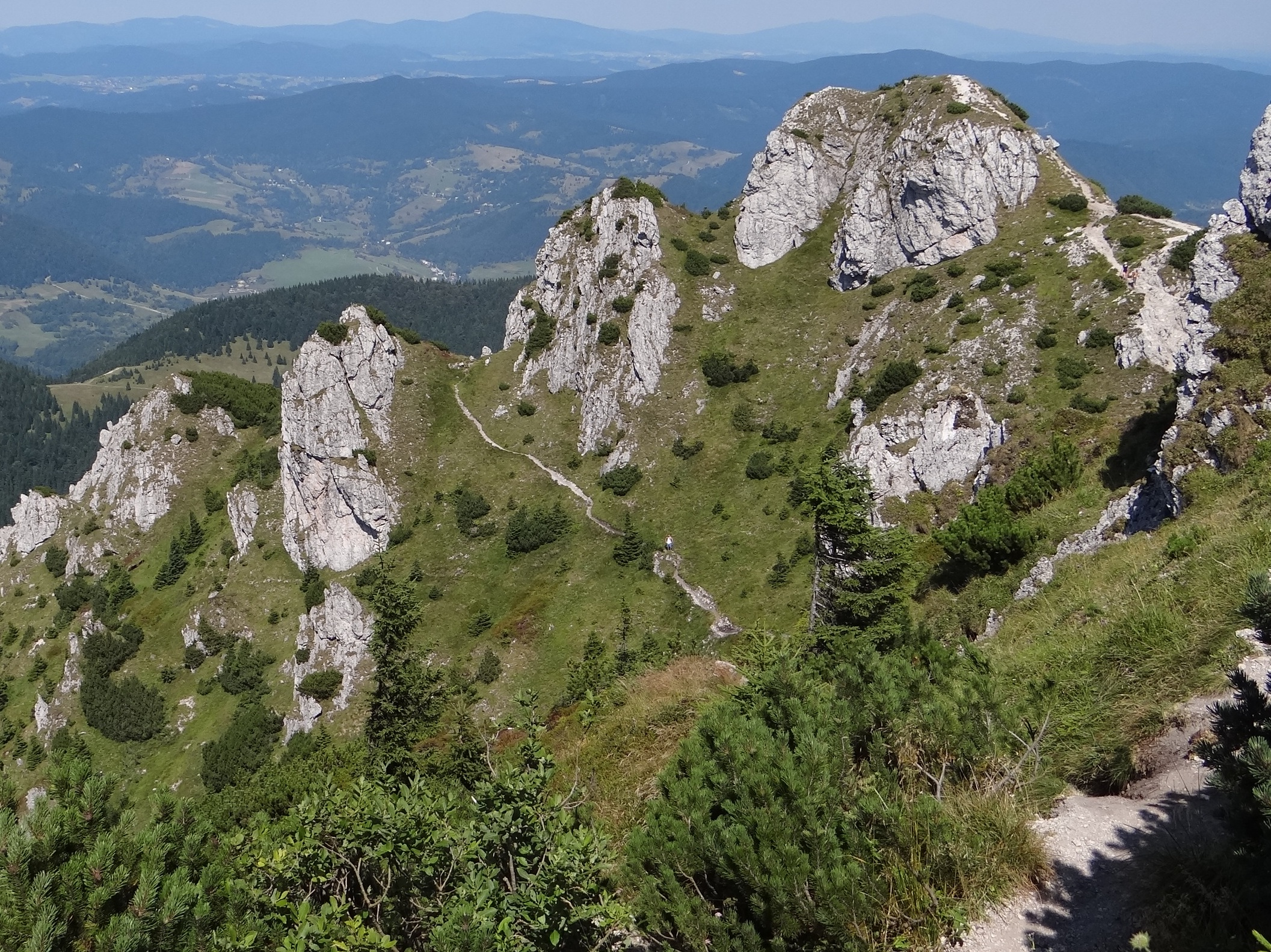 Veľký Rozsutec